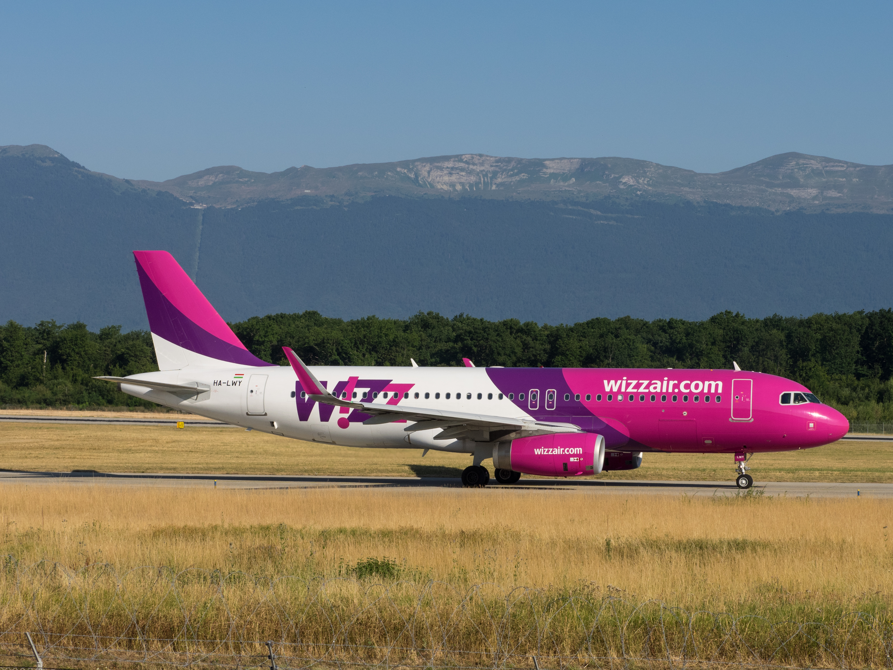 GVA 11.07.2015